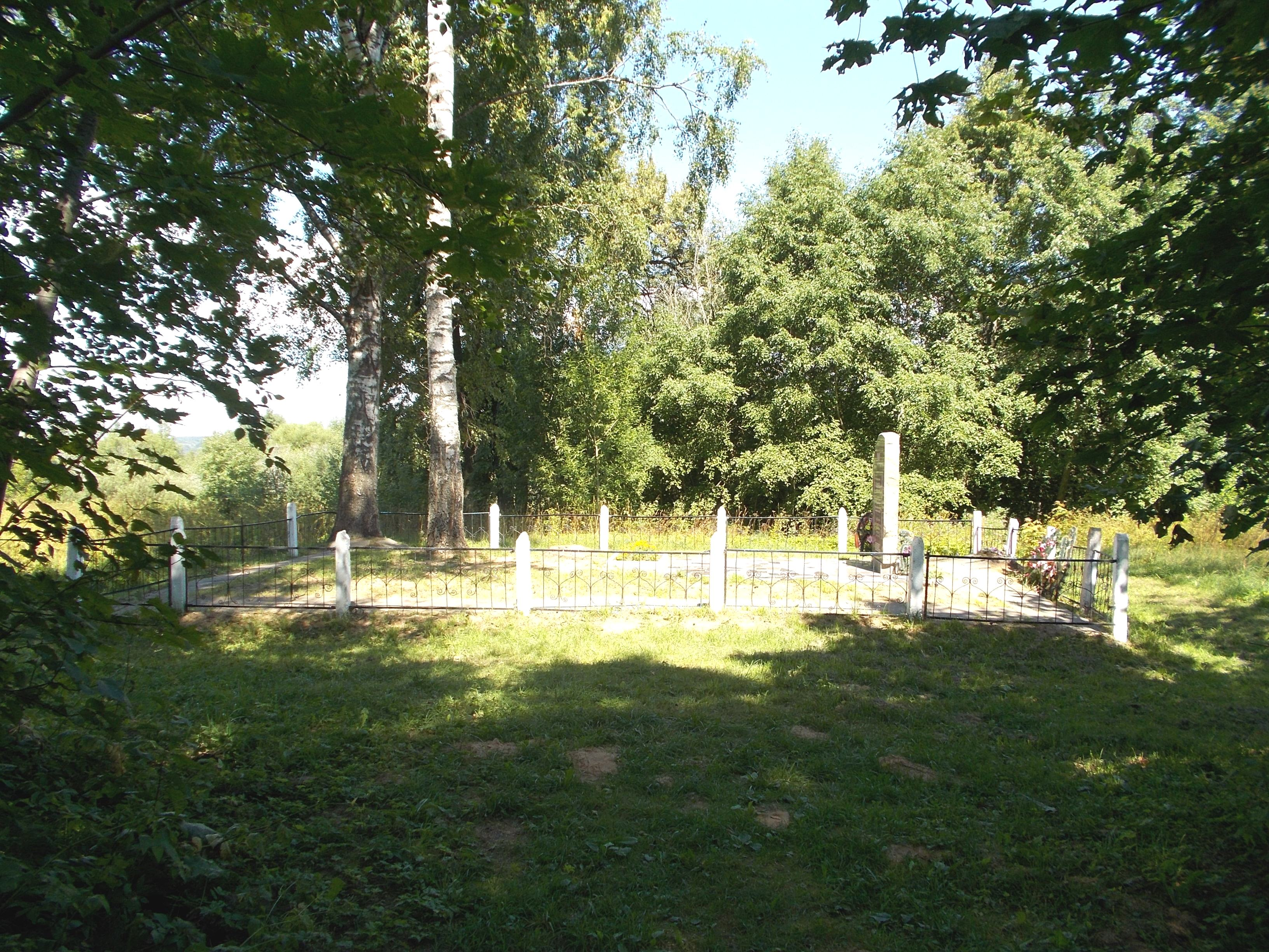 Освея. Новый памятник (2012 год) в парке недалеко от старинного дворца Шадурских на месте убийства евреев - узников Освейского гетто.